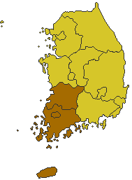 호남지방에 대한 지도(문제가 발생한다면, 말씀해주세요.)